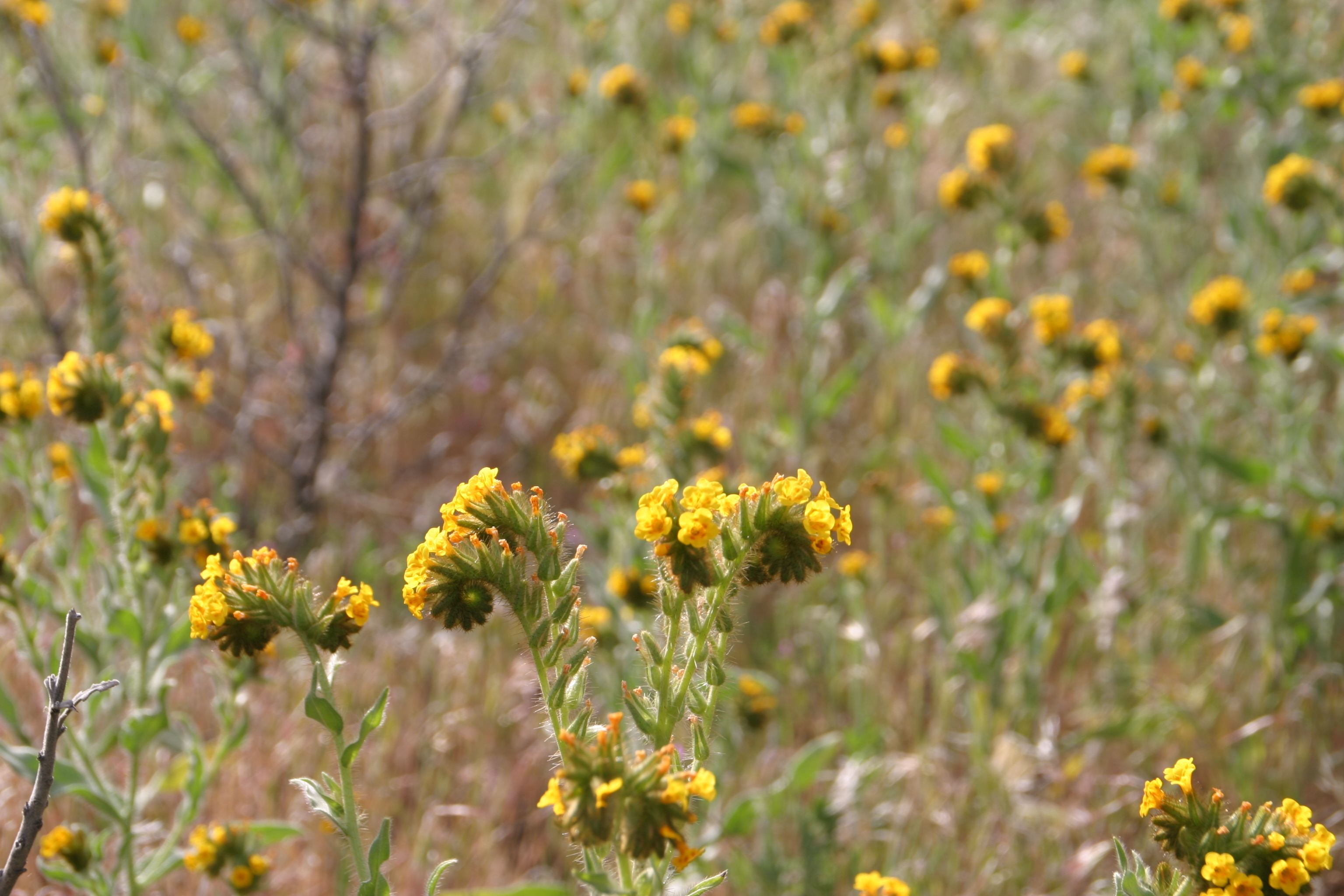 Amsinckia menziesii (Menzies' fiddleneck)